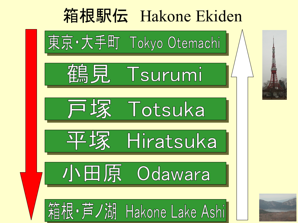 作者制作です。 図内の写真は作者撮影しました。 文字を大きくして改良しました。 外国人にも配慮して英語も併記しています。